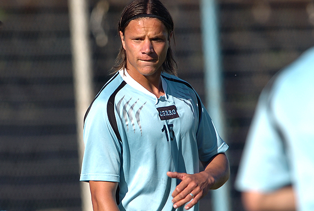 Futbolista Uruguayo.